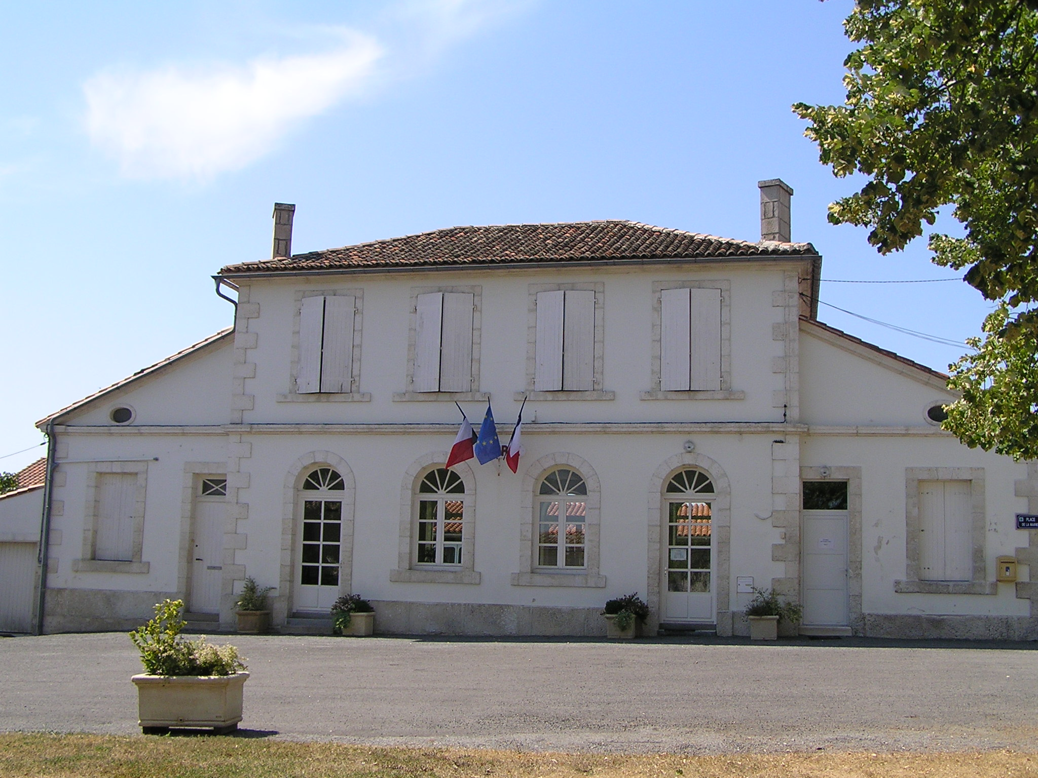 mairie de Saint-Amant-de-Nouère